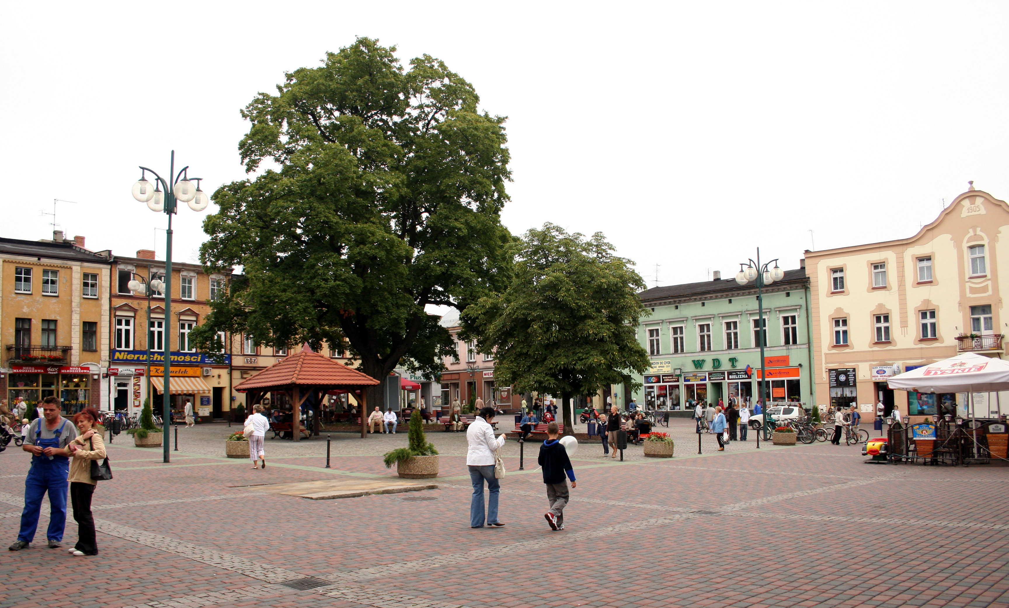 plac rynkowy w Lublińcu